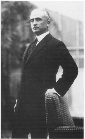 Politico e militare italiano, ministro del Regno d'Italia nel governo Mussolini